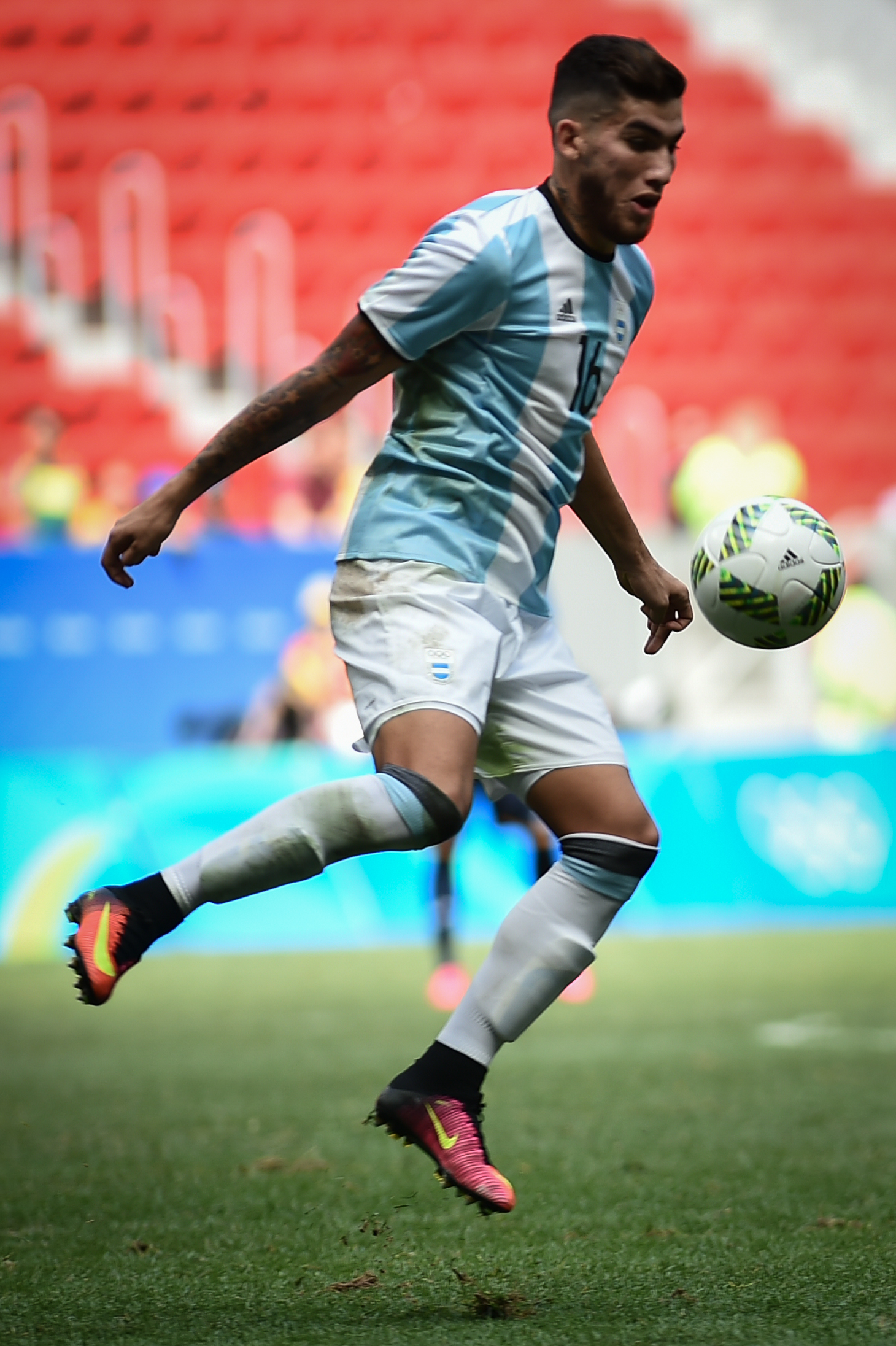 Estádio Nacional de Brasília Mané Garrincha, Brasília, DF, Brasil, 10/8/2016 Foto: Andre Borges/Agência Brasília Argentina e Honduras jogam nesta quarta-feira (10), no Estádio Mané Garrincha, pelo grupo D do futebol masculino nas Olimpíadas 2016.